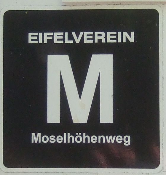 Hinweisschild Moselhöhenweg in Trier-Ehrang